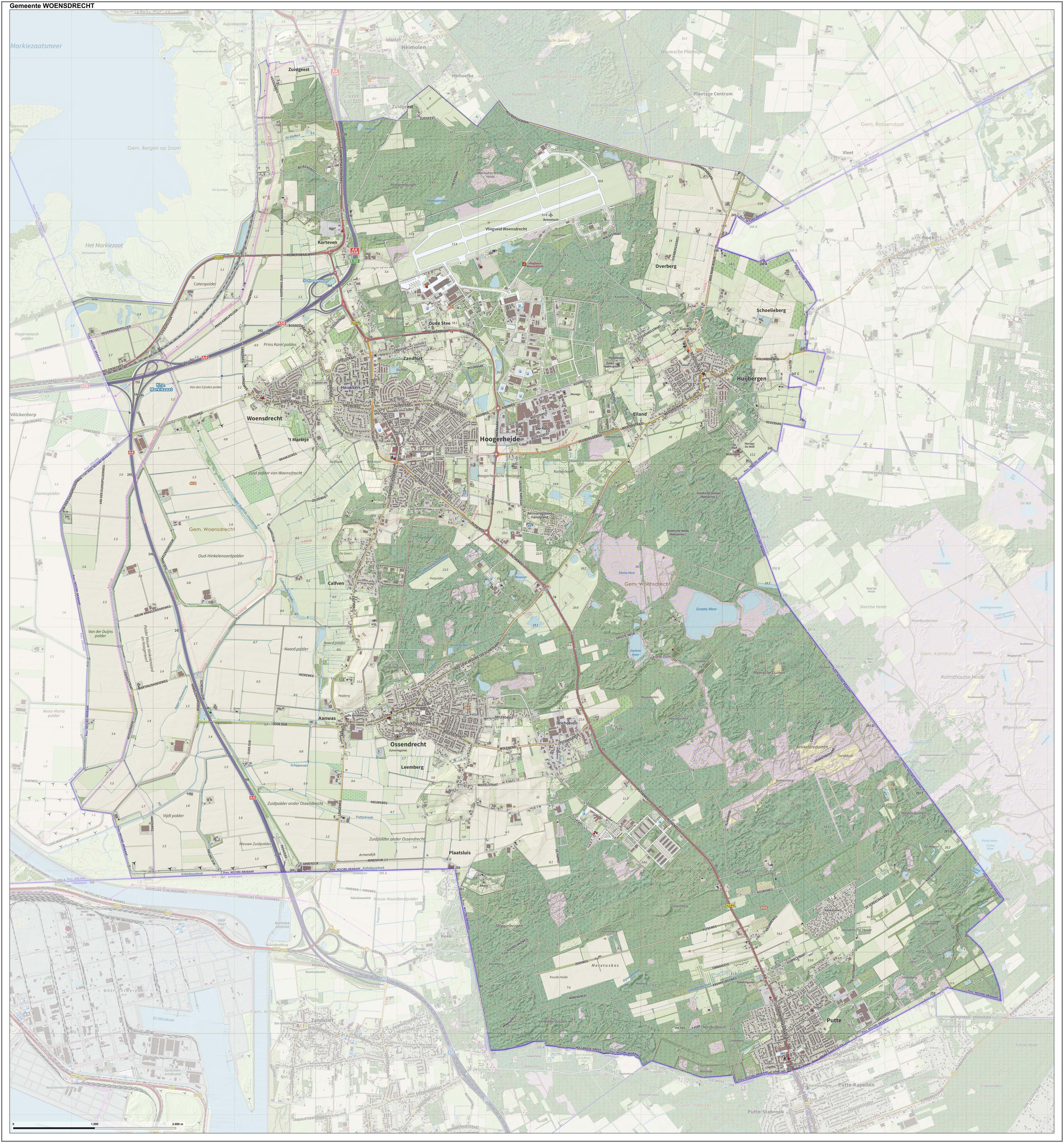 Topografische gemeentekaart. Resolutie: 400 pixels/km. Kaartbeeld samengesteld uit de open geodata van de Top10NL en Top25namen, Creative Commons BY licentie. Gebouwvlakken uit open geodata BAG extract. Wegen uit de OpenStreetMap, OpenStreetMap community. Schaduwreliëf uit de Actuele Hoogtekaart AHN2, RWS en Waterschappen. Samenstelling en kleurenschema: Jan-Willem van Aalst, met QGIS2. Zie ook de Legenda.